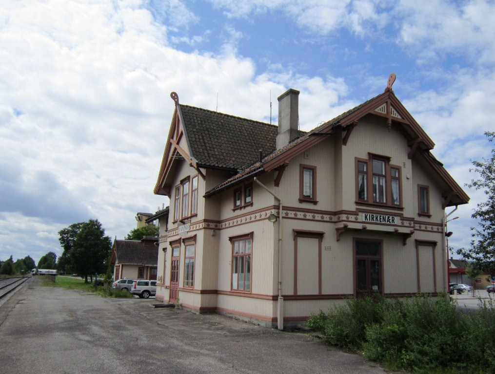 Kirkenær stasjon på Solørbanen